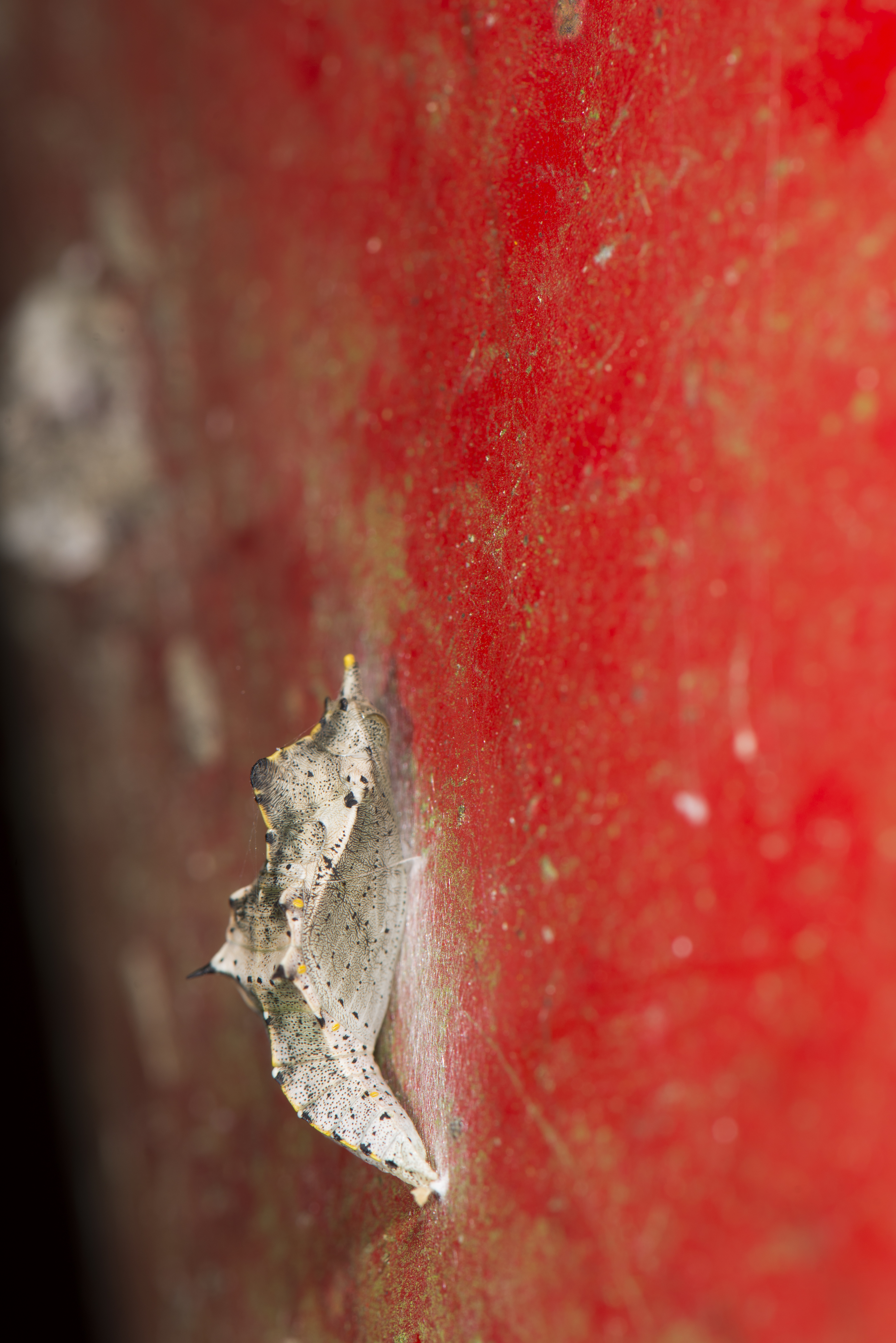 _ESI4354 Pieris canidia